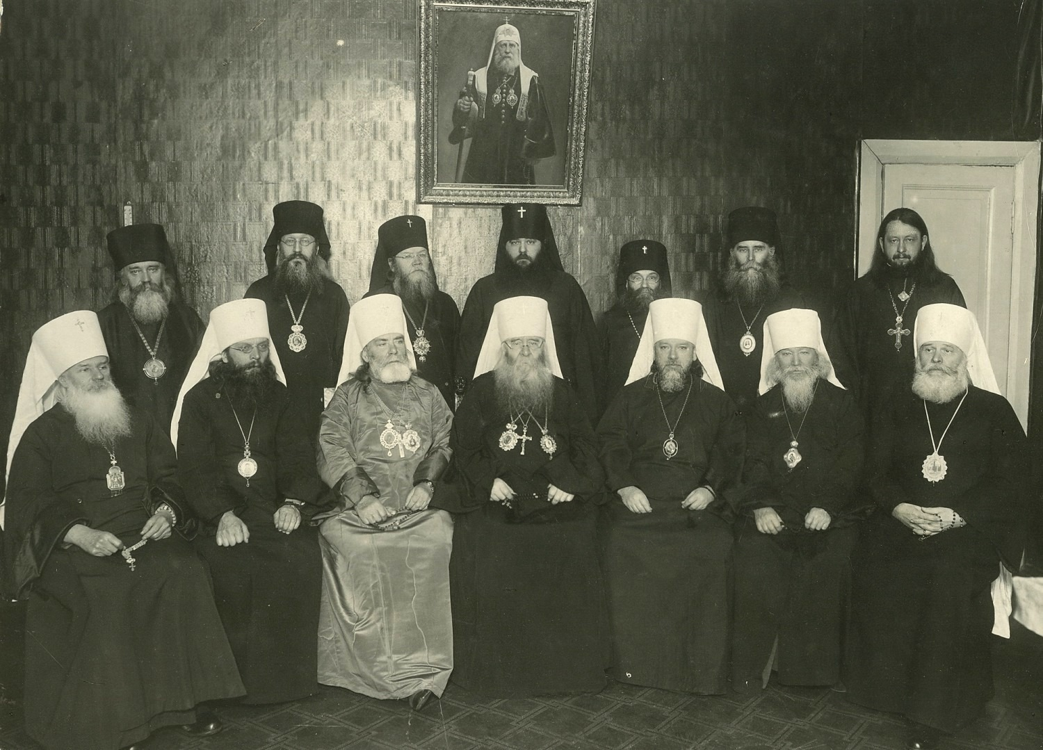 Веременный Патрирший Священный Синод при заместителе Патриаршего Местоблюстителя митрополите Нижегородском Сергии (Страгородском). Зимняя сессия 1934/1935 годов. 1 ряд (слева направо): митр. Ярославский Павел (Борисовский), митр. Одесский Анатолий (Грисюк), митр. Ташкентский Арсений (Стадницкий), митр. Московский Сергий (Страгородский), митр. Ленинградский Алексий (Симанский), митр. Казанский Серафим (Александров), митр. Киевский Константин (Дьяков). 2 ряд (слева направо): еп. Боровичский Никита (Стягов) архиеп. Архангельский Никон (Пурлевский) архиеп. Ивановский Павел (Гальковский) архиеп. Дмитровский Питирим (Крылов) архиеп. Вятский Киприан (Комаровский), еп. Пятигорский Мефодий (Абрамкин), управляющий делами Синода прот. Александр Лебедев.